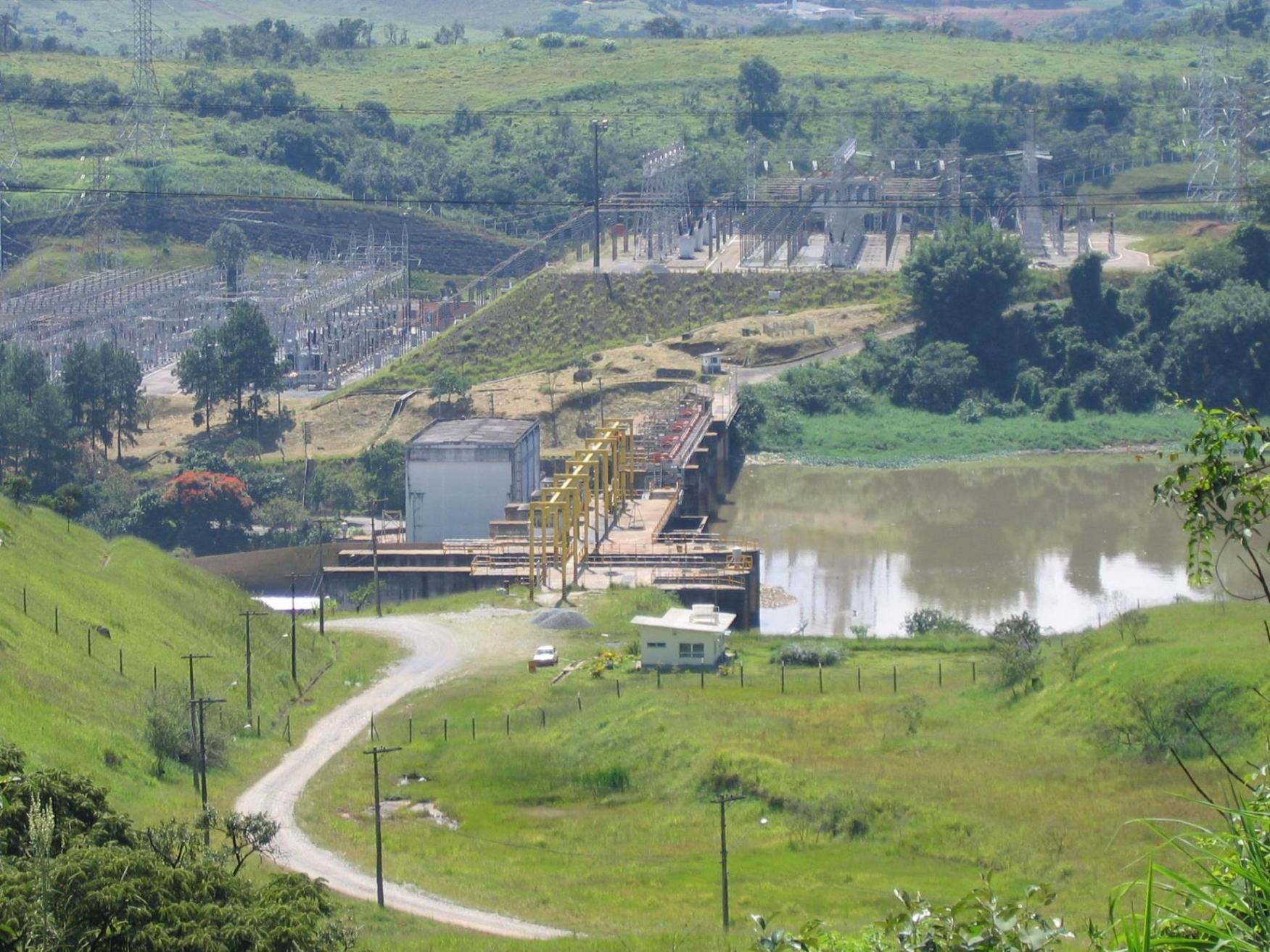 Barragem Edgard de Souza